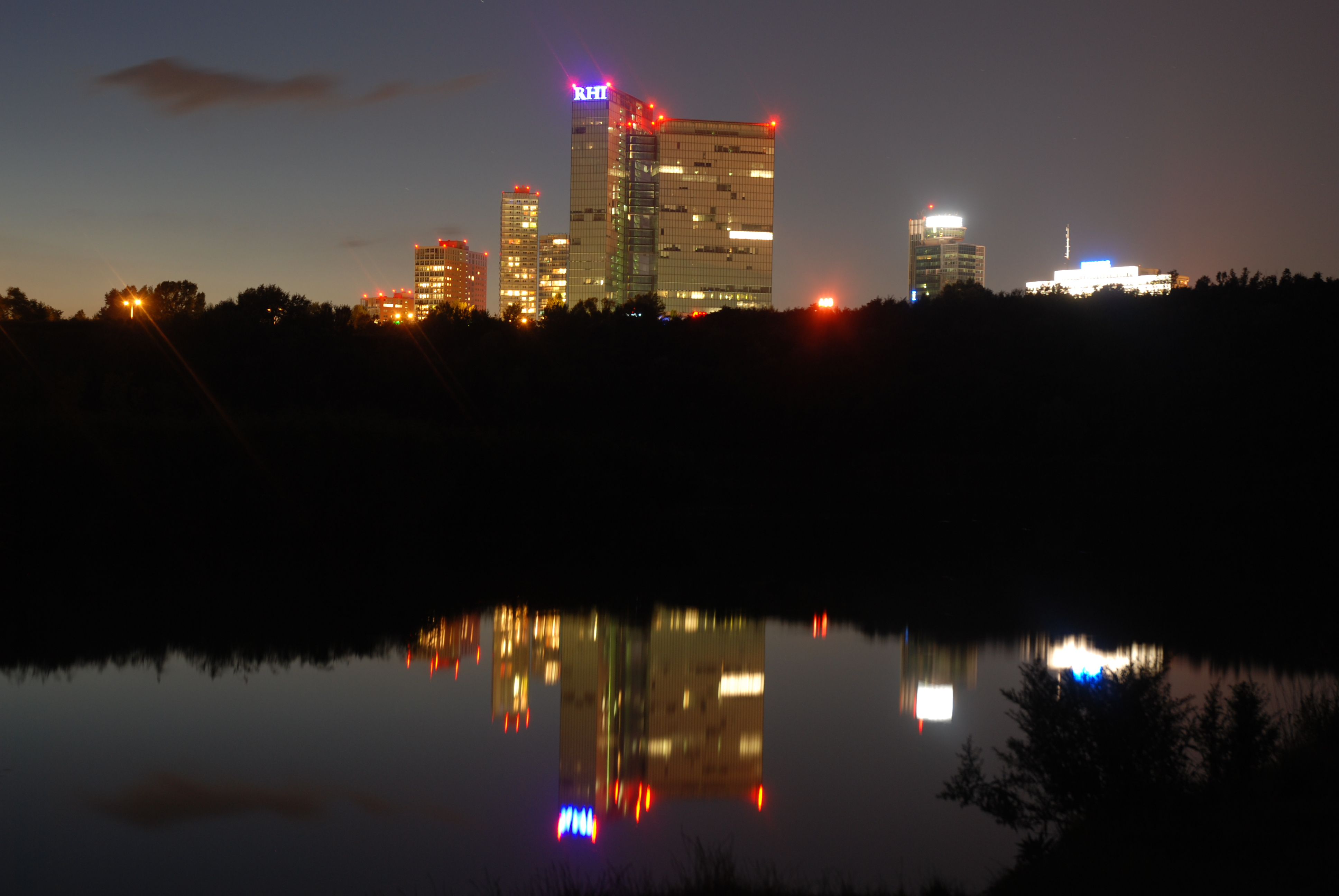 Wienerbergcity bei Nacht